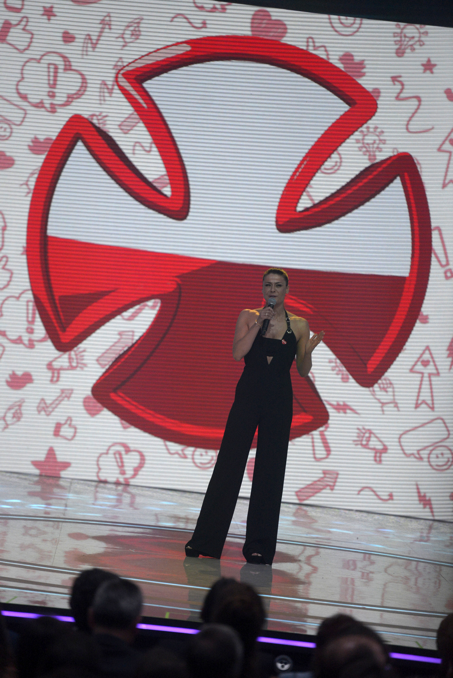 02 Diciembre 2016, Ministra Paula Narváez asiste a ceremonia de inauguración de Teleton 2016.